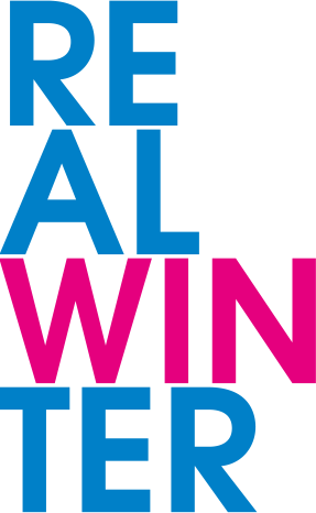 Фирменный слоган RE AL WIN TER